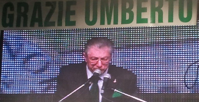 Umberto Bossi alla festa dell'orgoglio padano a Bergamo.